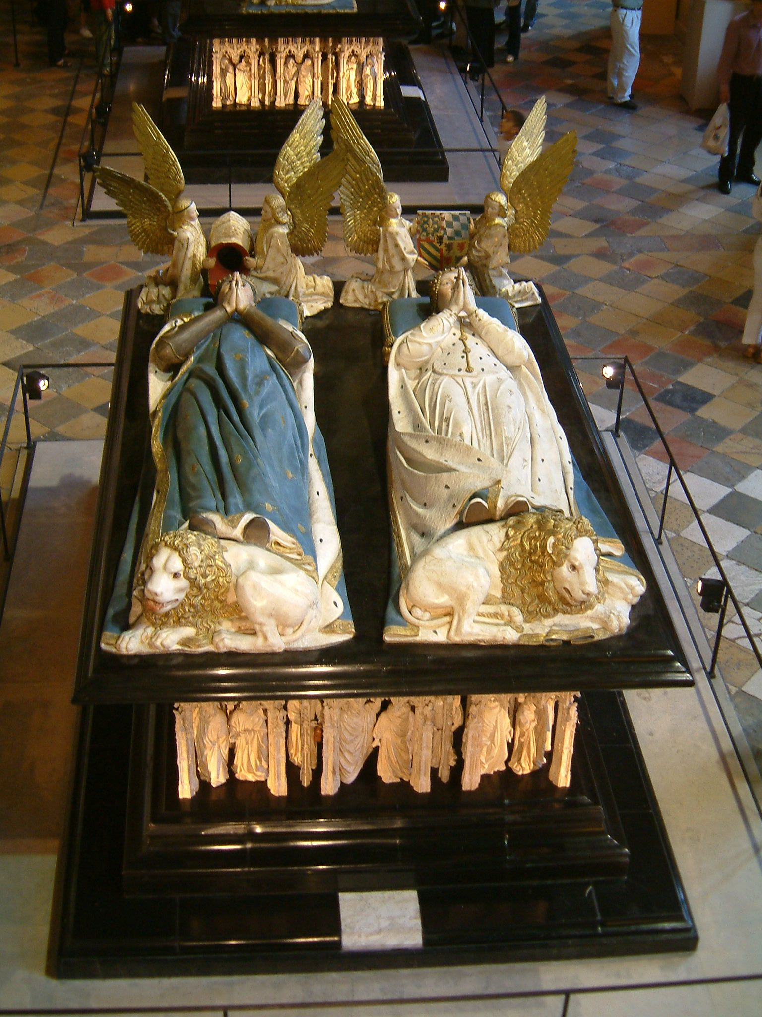 Tombeau de Jean Sans Peur et Marguerite de Bavière. Salle des gardes, Musée des Beaux-Arts de Dijon, Dijon, Bourgogne, FRANCE.